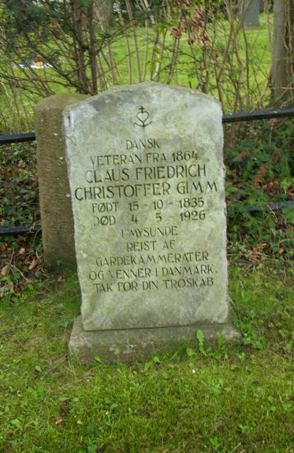 Danske soldatergrave på Brodersby kirkegård, i Angel / Sydslesvig.